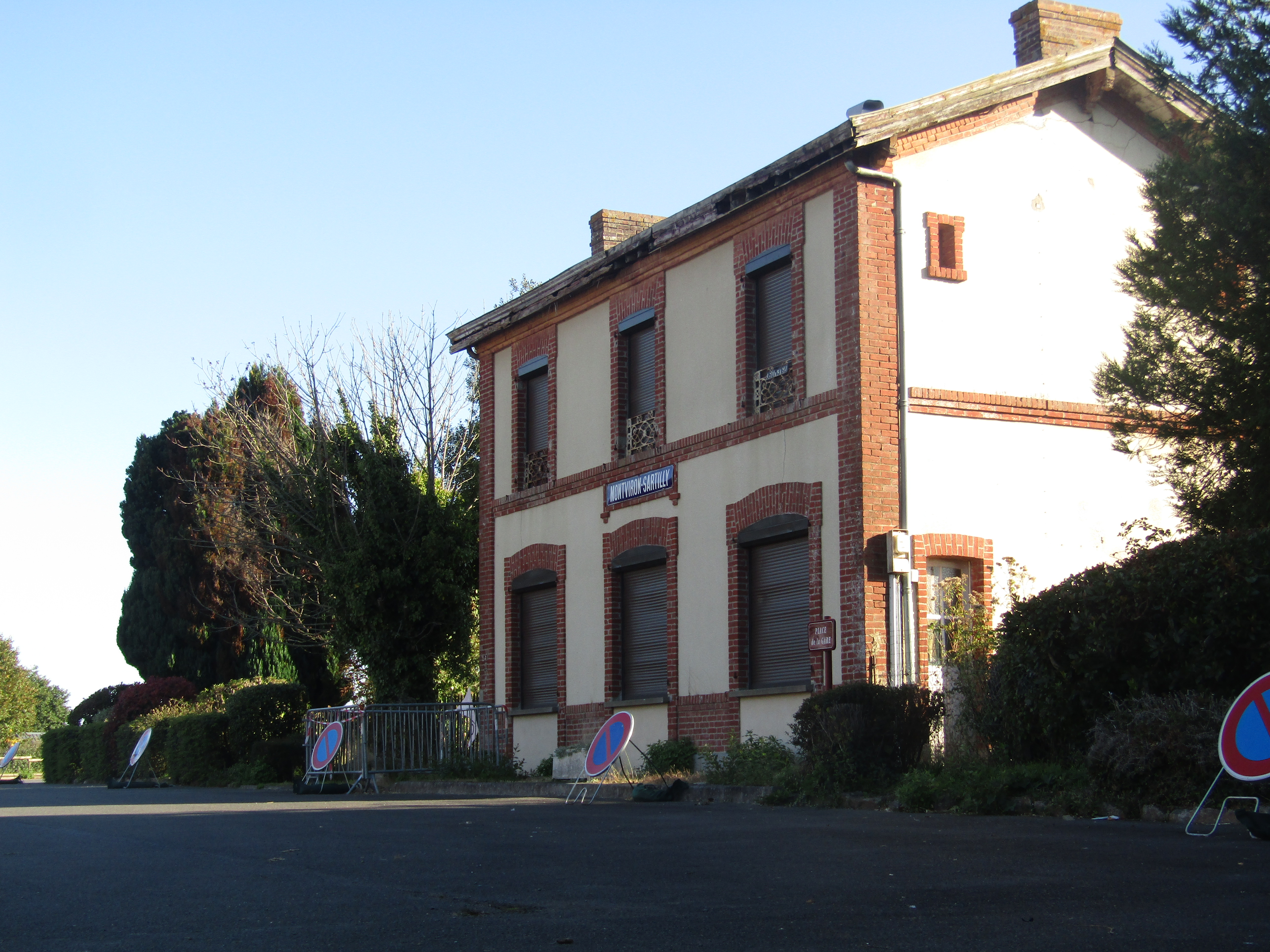 Le bâtiment voyageurs de la Gare de Montviron - Sartilly en septembre 2018